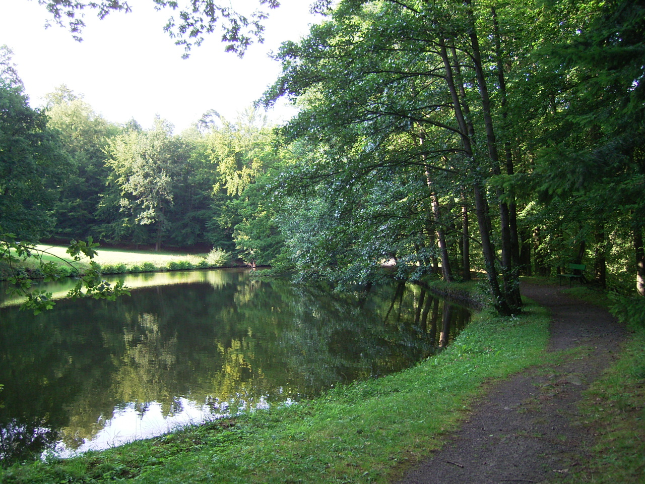 Bergpark wilhelmshoehe am fontaenenreservoir, 2005